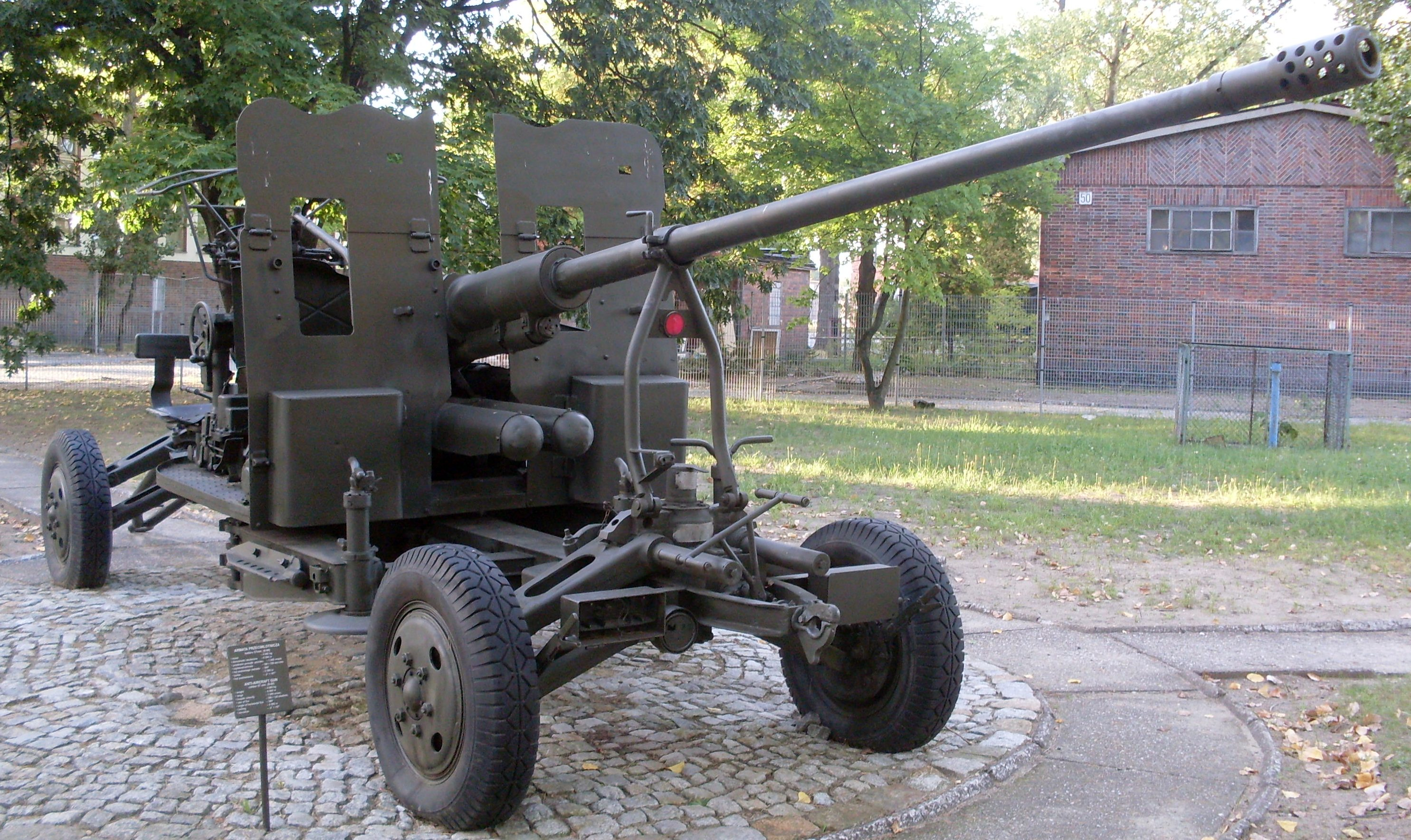 57_mm_armata_plot_S_60